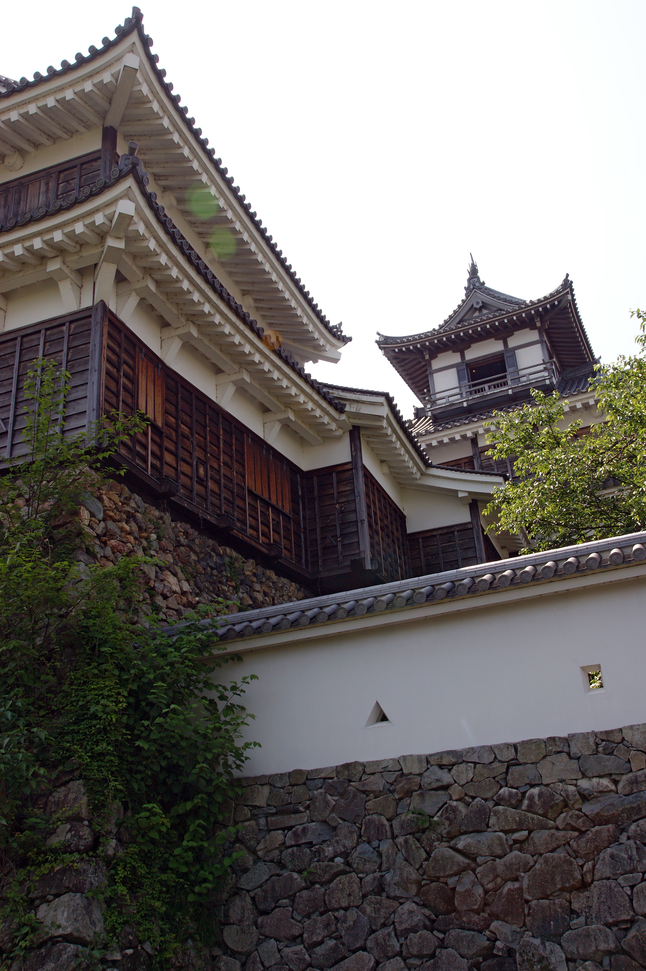 Fukuchiyama Castle in Fukuchiyama, Kyoto prefecture, Japan